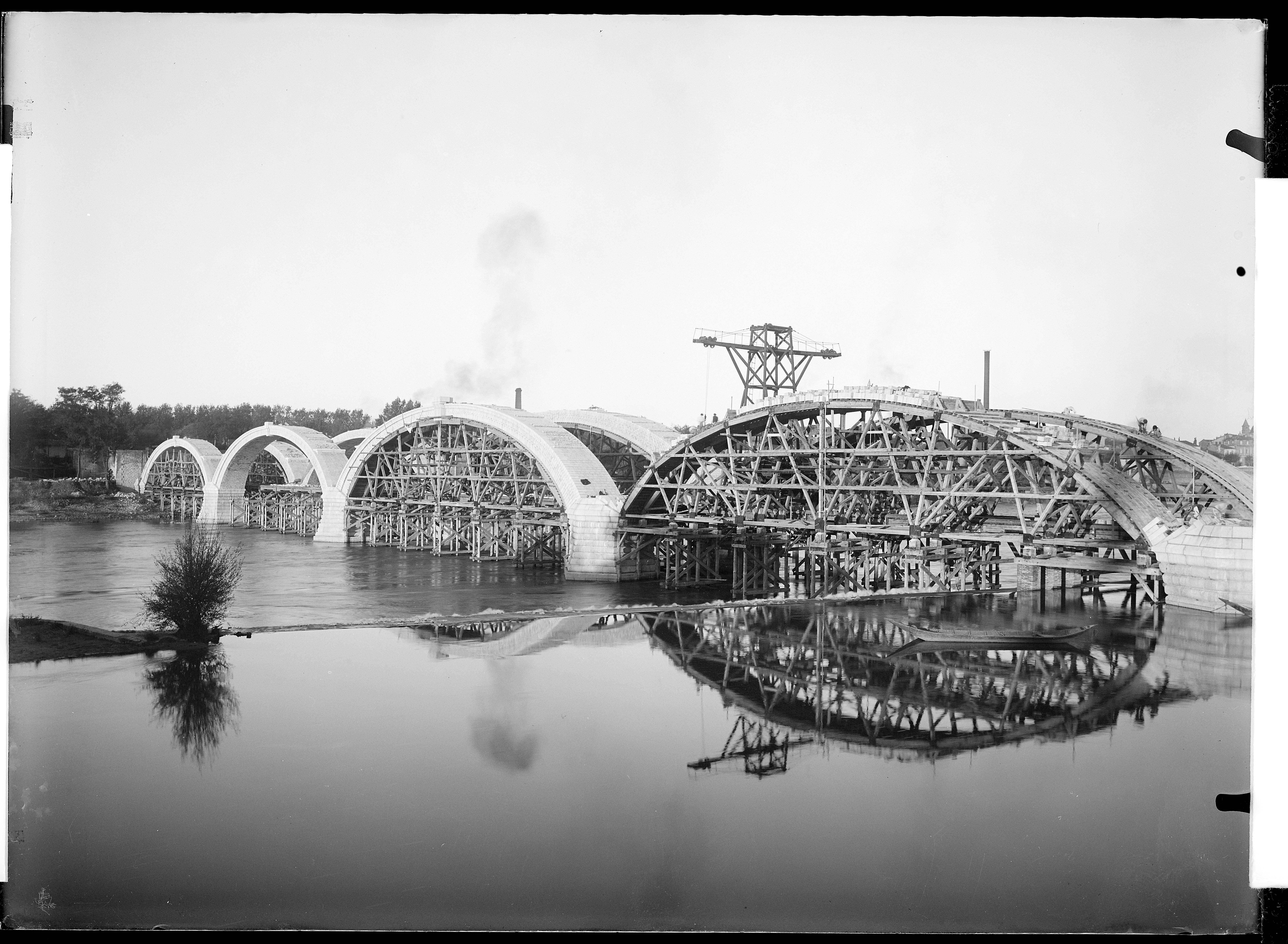 plaque négative au gélatino-bromure d'argent format 13x18cm. Sans inscription ni mention d'auteur.